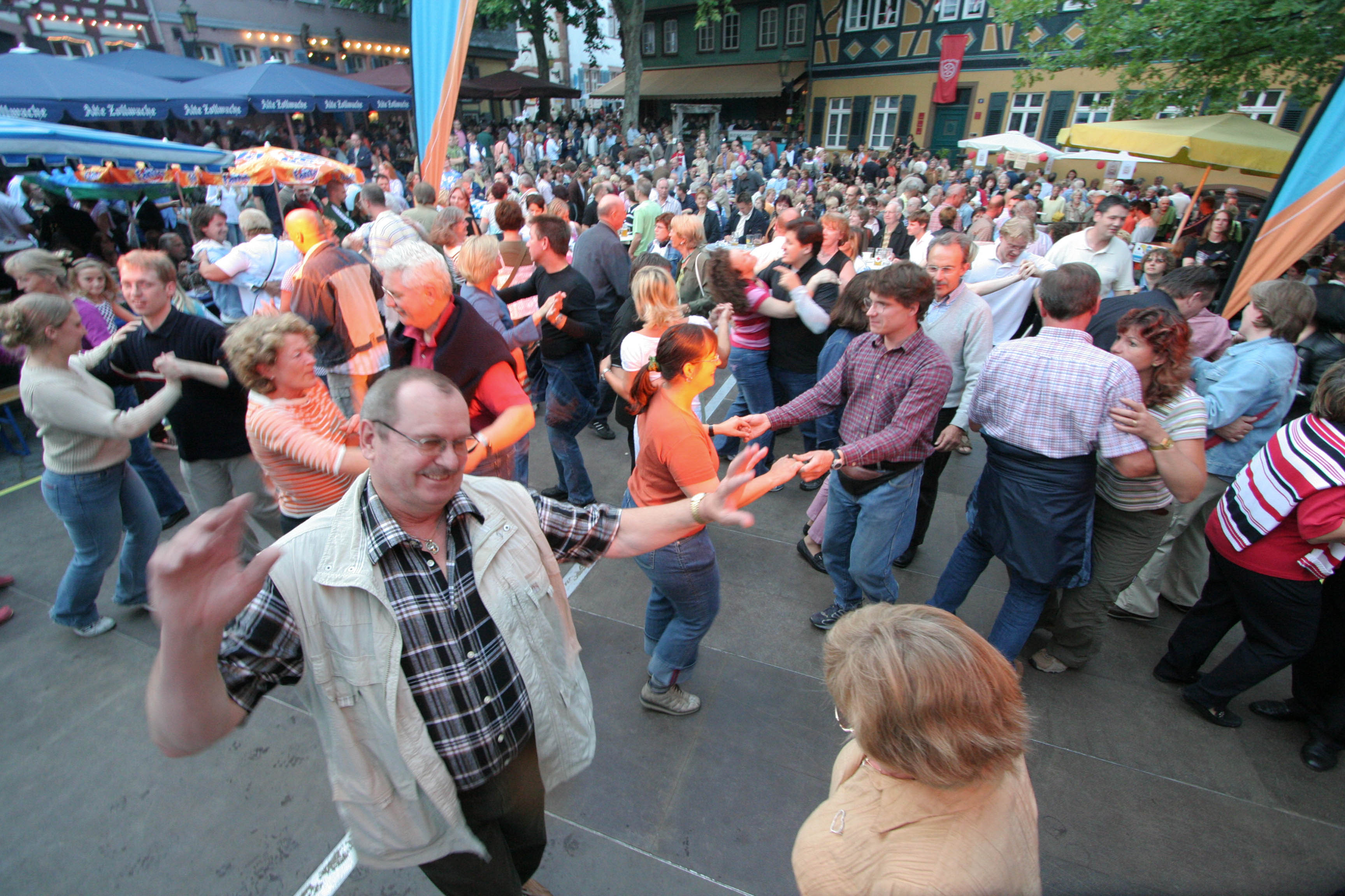 Schlossfest in Höchst (Frankfurt), Schlossplatz, Tanzbühne